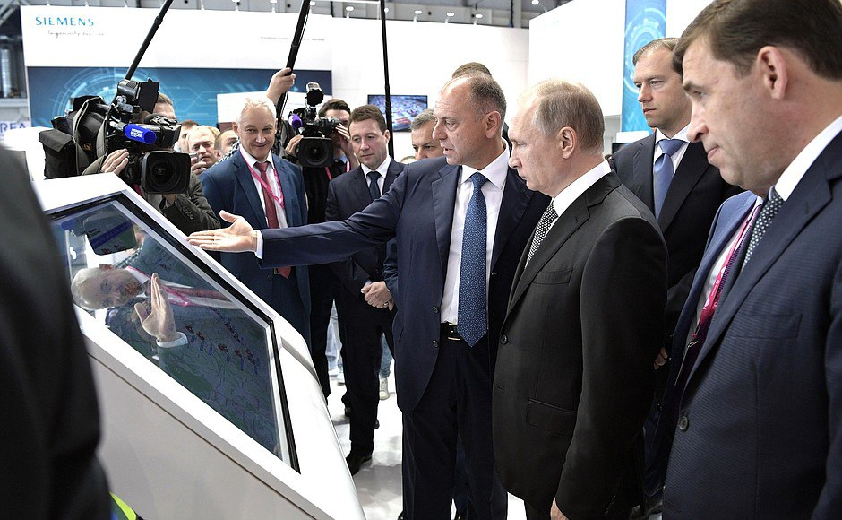 Владимир Путин на Международной выставке промышленности и инноваций Иннопром-2017 в Екатеринбурге